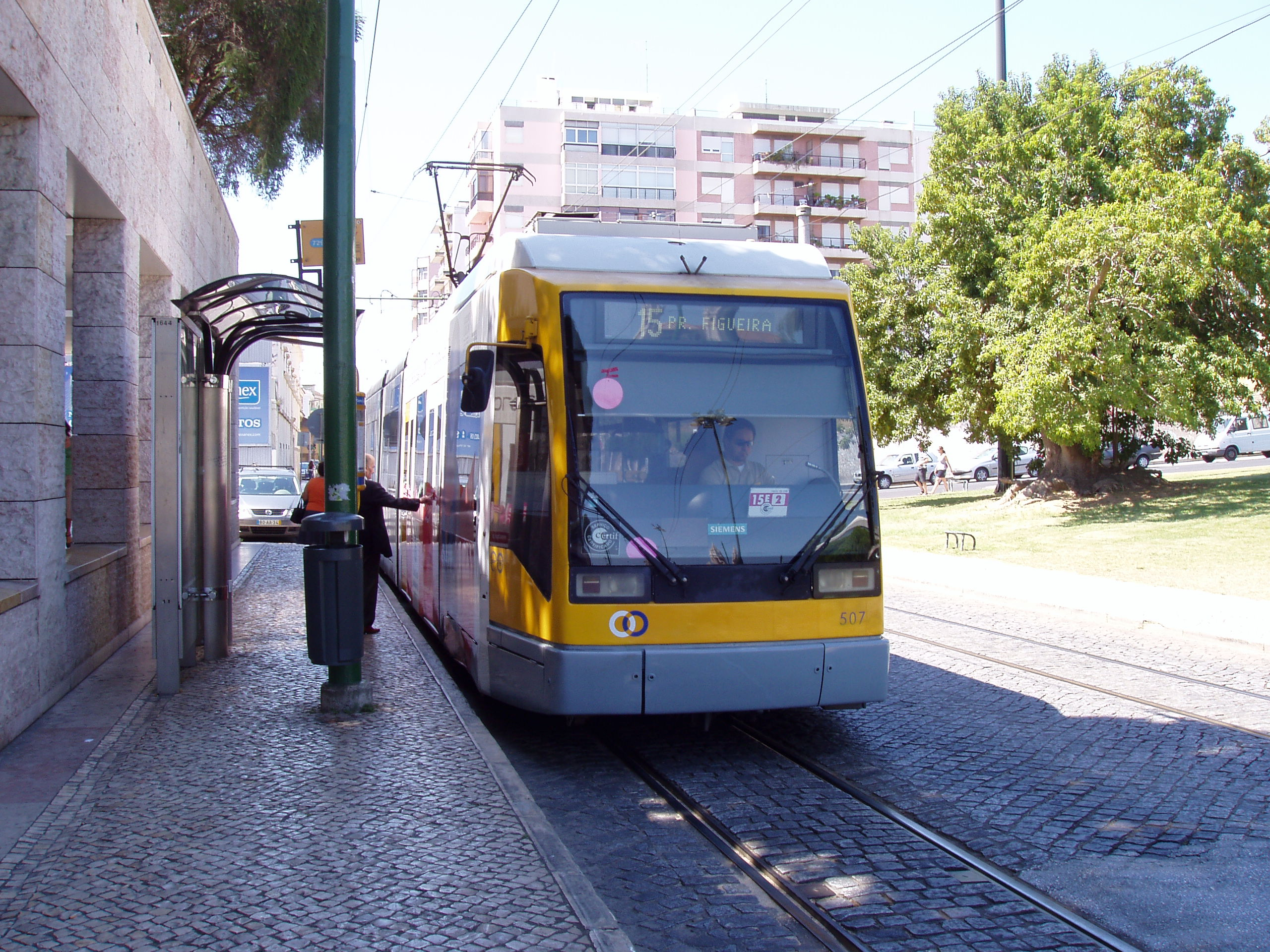 Siemens/DÜWAG CCFL507; CCB - Praça do Império, Lisboa, Portugal